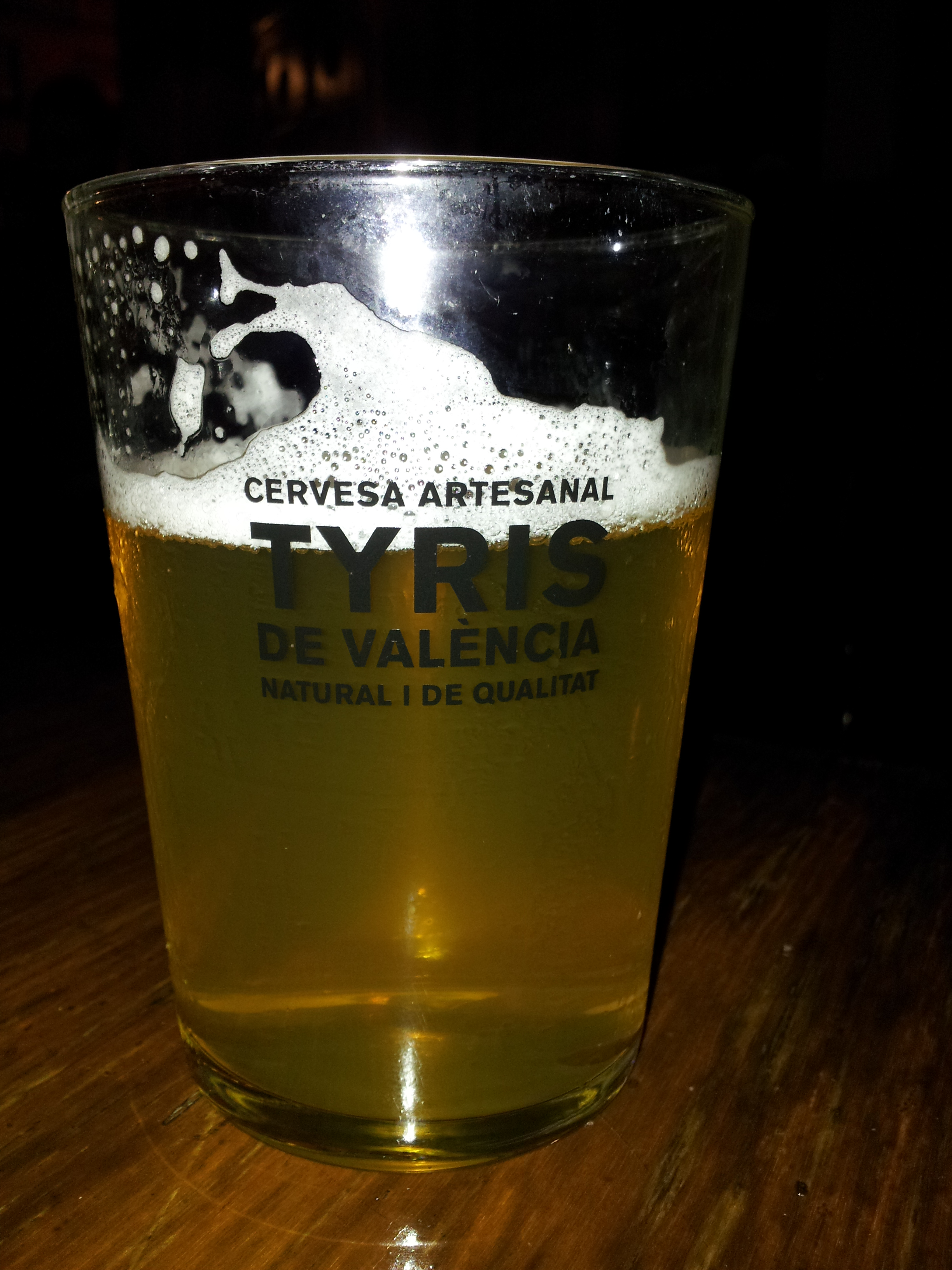 Cervesa Tyris de barril a The Market CraftBeer.